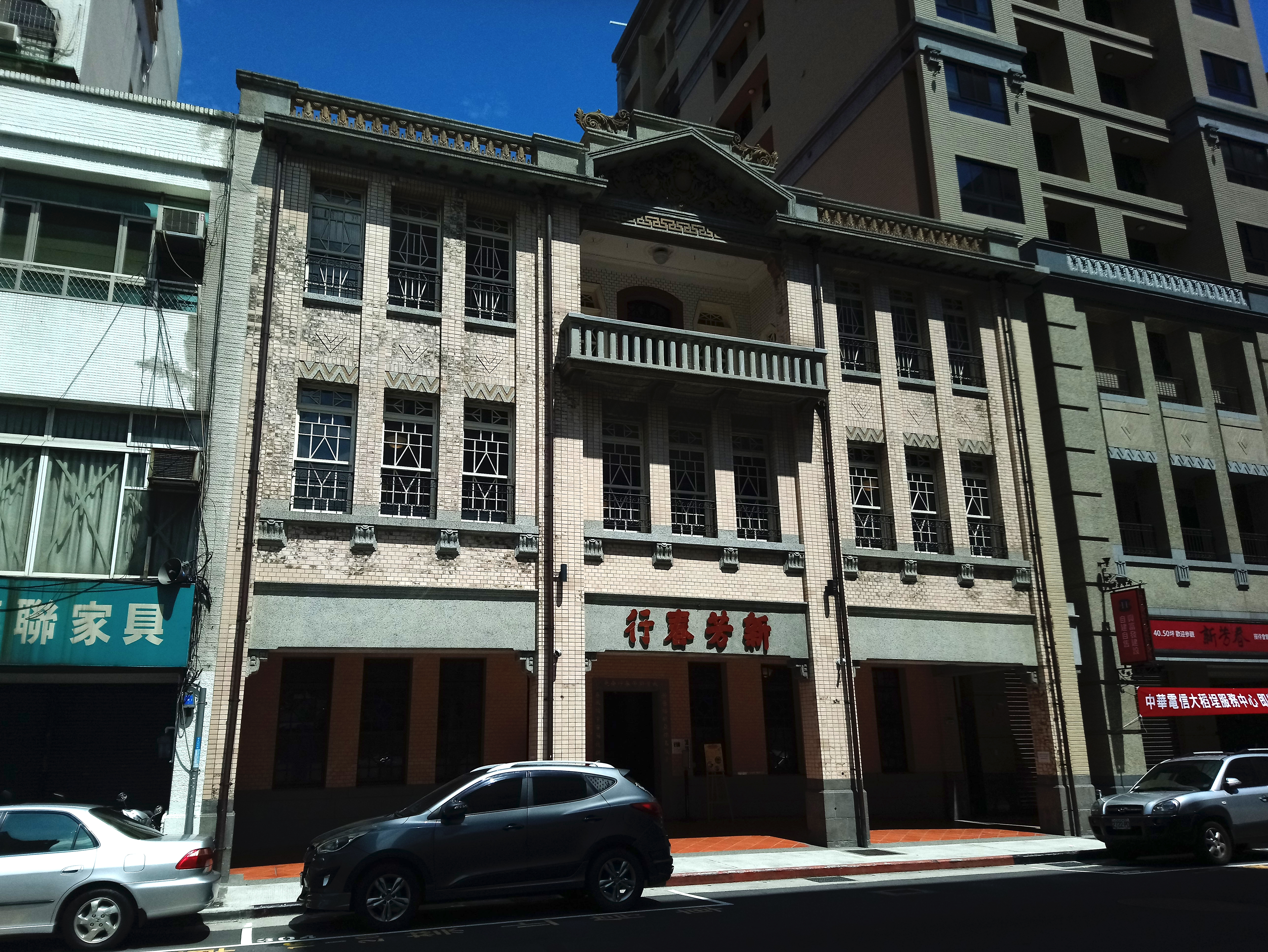 整修後的新芳春茶行正面。